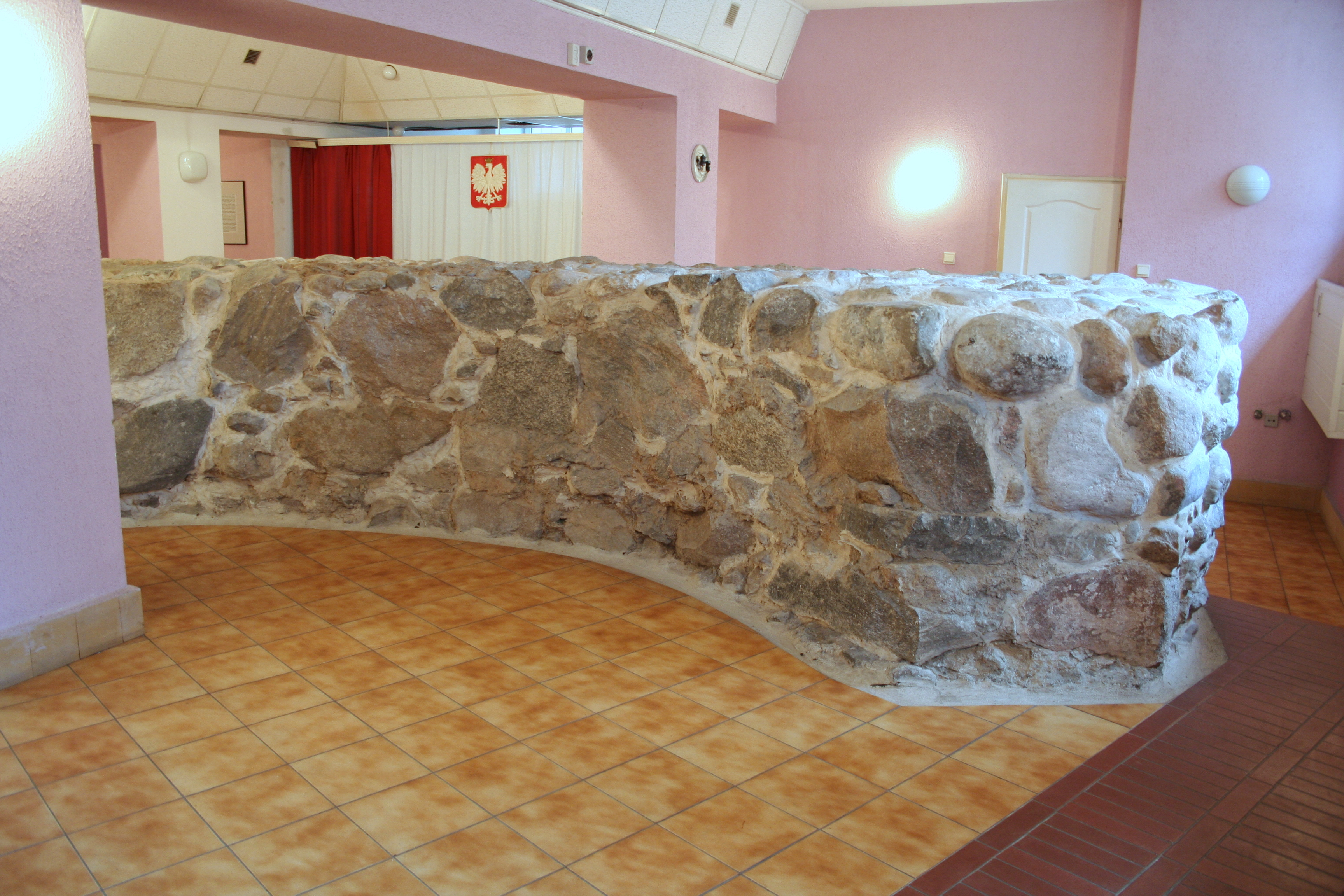 Toruń, relikty baszty Koci Ogon na terenie dzisiejszego aresztu śledczego